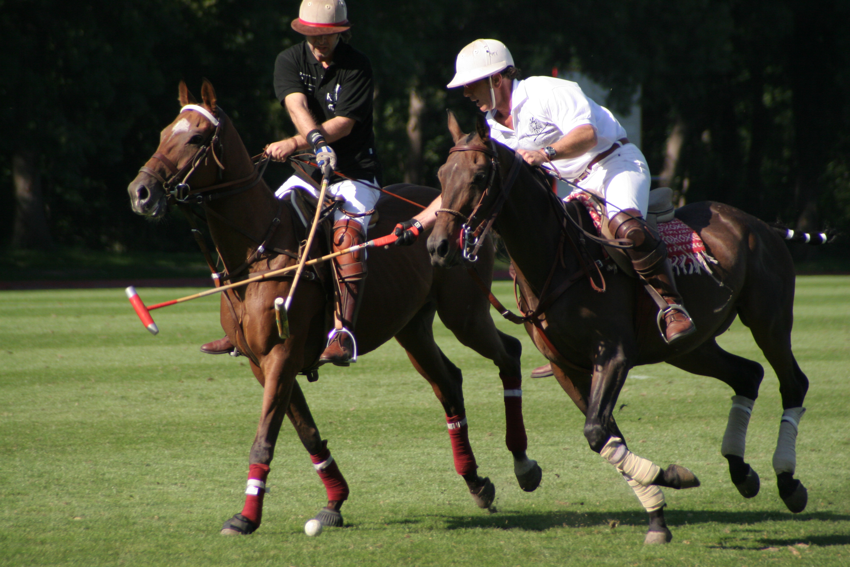 Polospiel